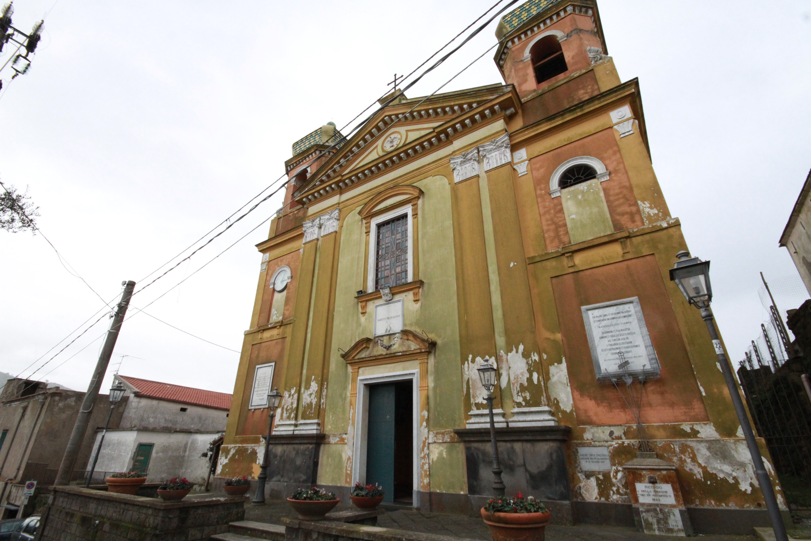 Parrocchia della Natività di Maria Vergine, Sant'Agnello